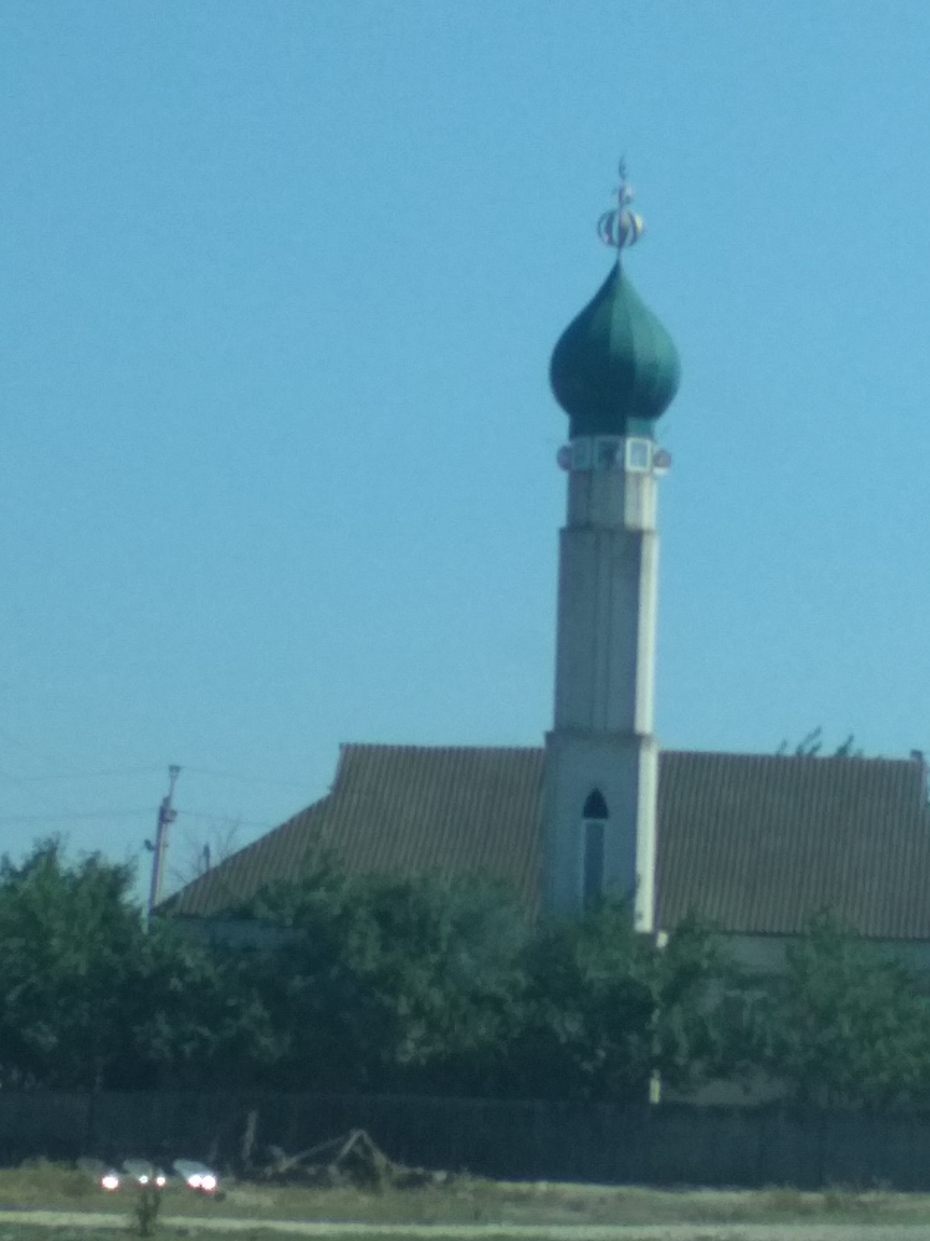 Нохчийн: Уцмиюртара маьждиг